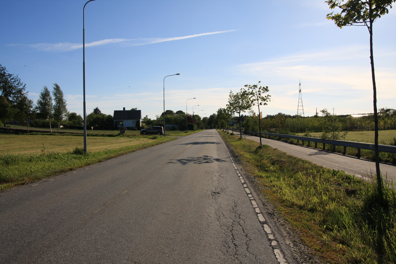 Fylkesvei 241 Heigreveien